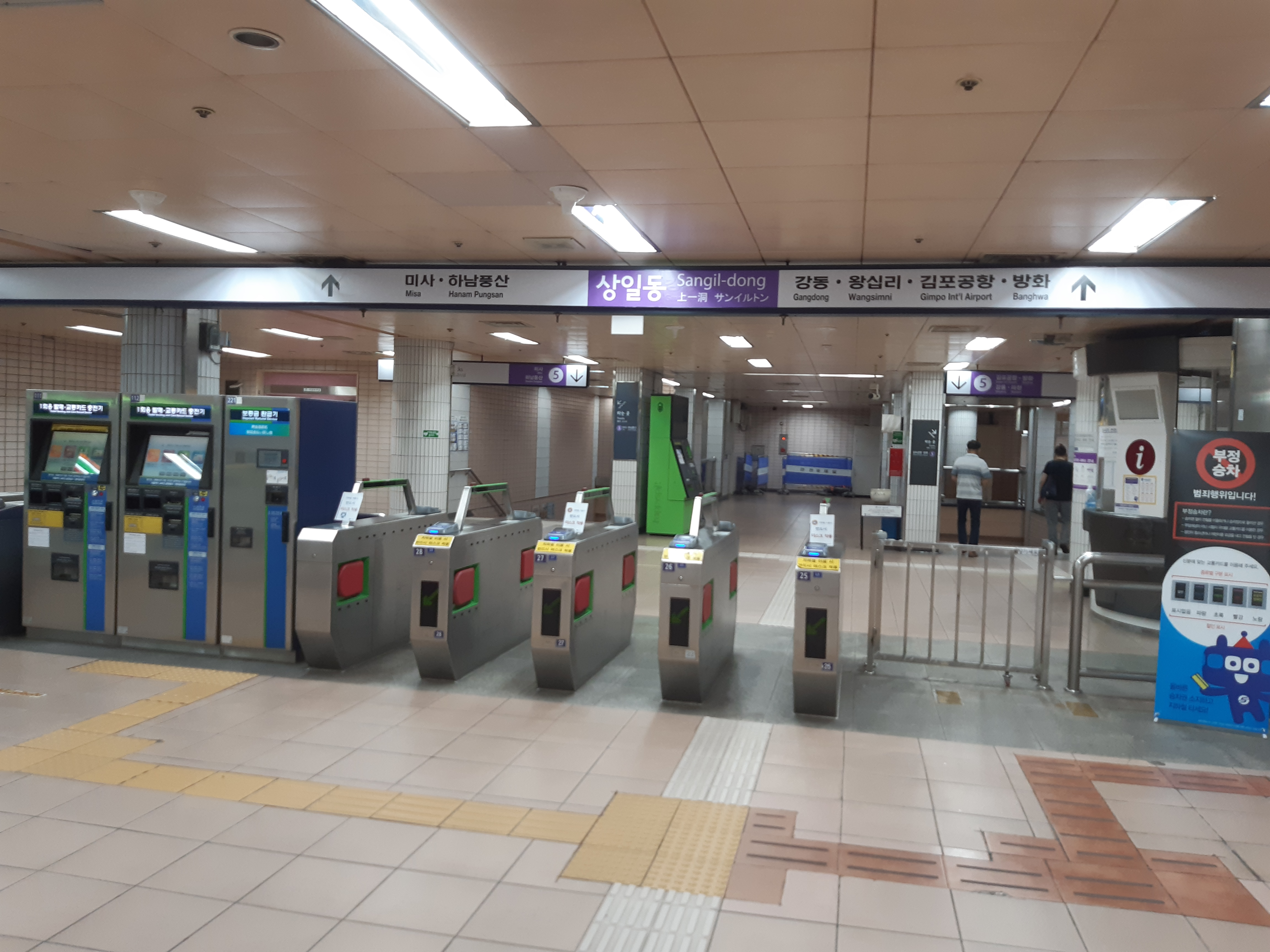 상일동역 게이트